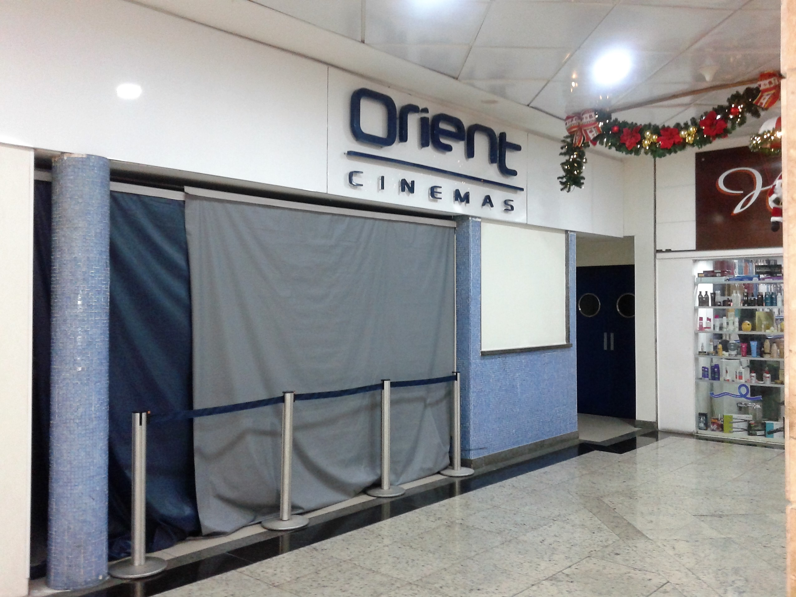 Orient Cinemas do Shopping Itaigara sendo preparado para reabertura